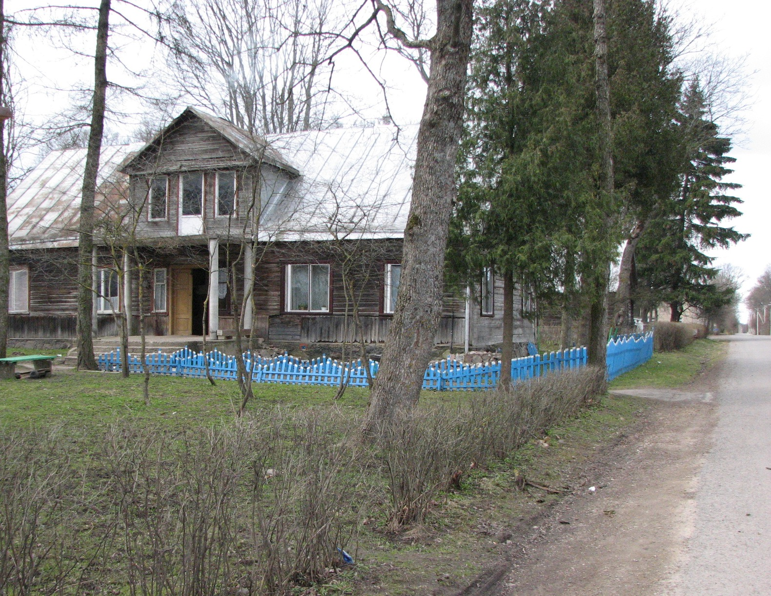 Autoriaus nuotrauka, 2007.04.07. Subačiaus pagrindinėje gatvėje. Nuotrauka gali būti platinama pagal GFDL licenciją.